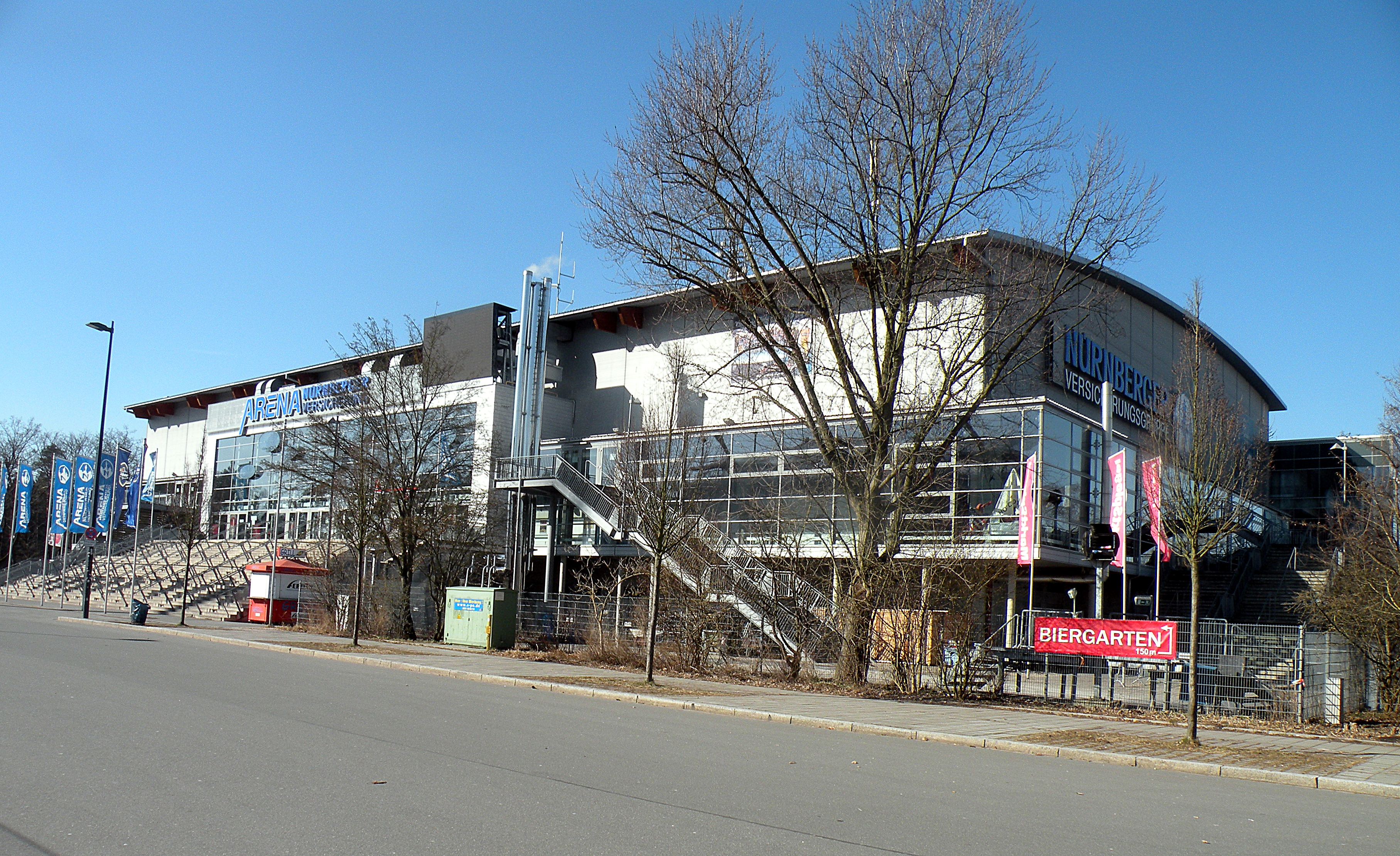 Ледяная арена.